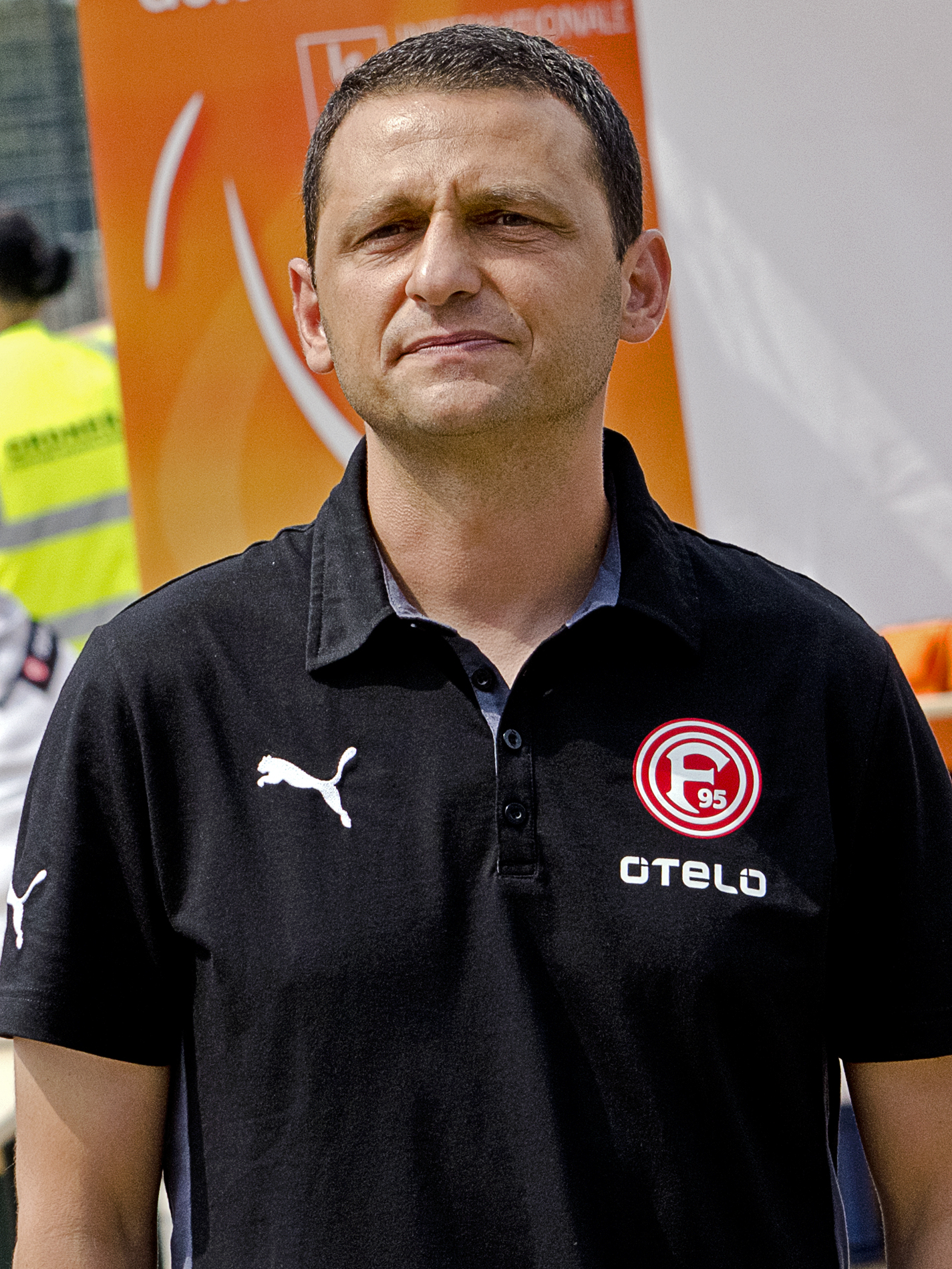 Joti Stamatopoulos, griechischer Fußballtrainer